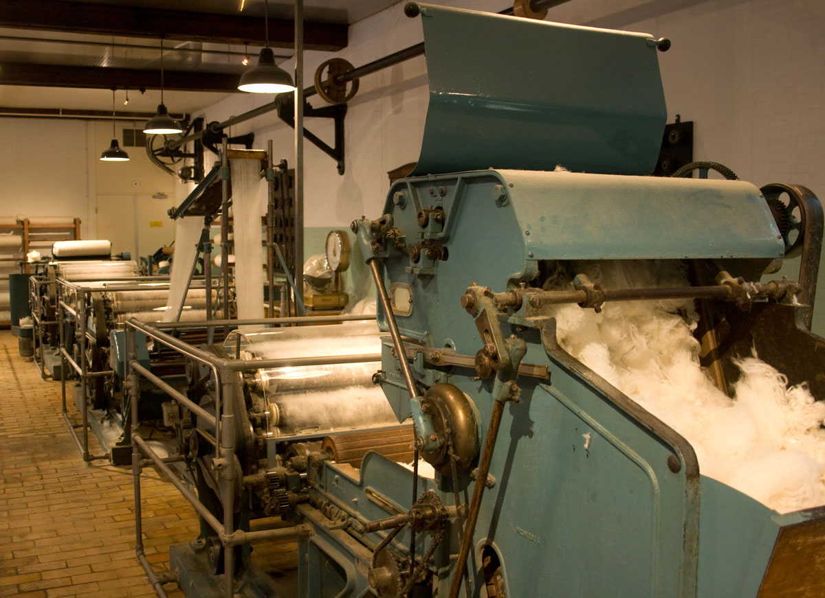 Kaardassortiment, Maschinenfabrik Memmingen, ca 1958 (03080) kaardassortiment (ca 1958)